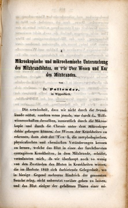 Erste Publizierung des Aufsatzes von Aloys Pollender über den Milzbrand